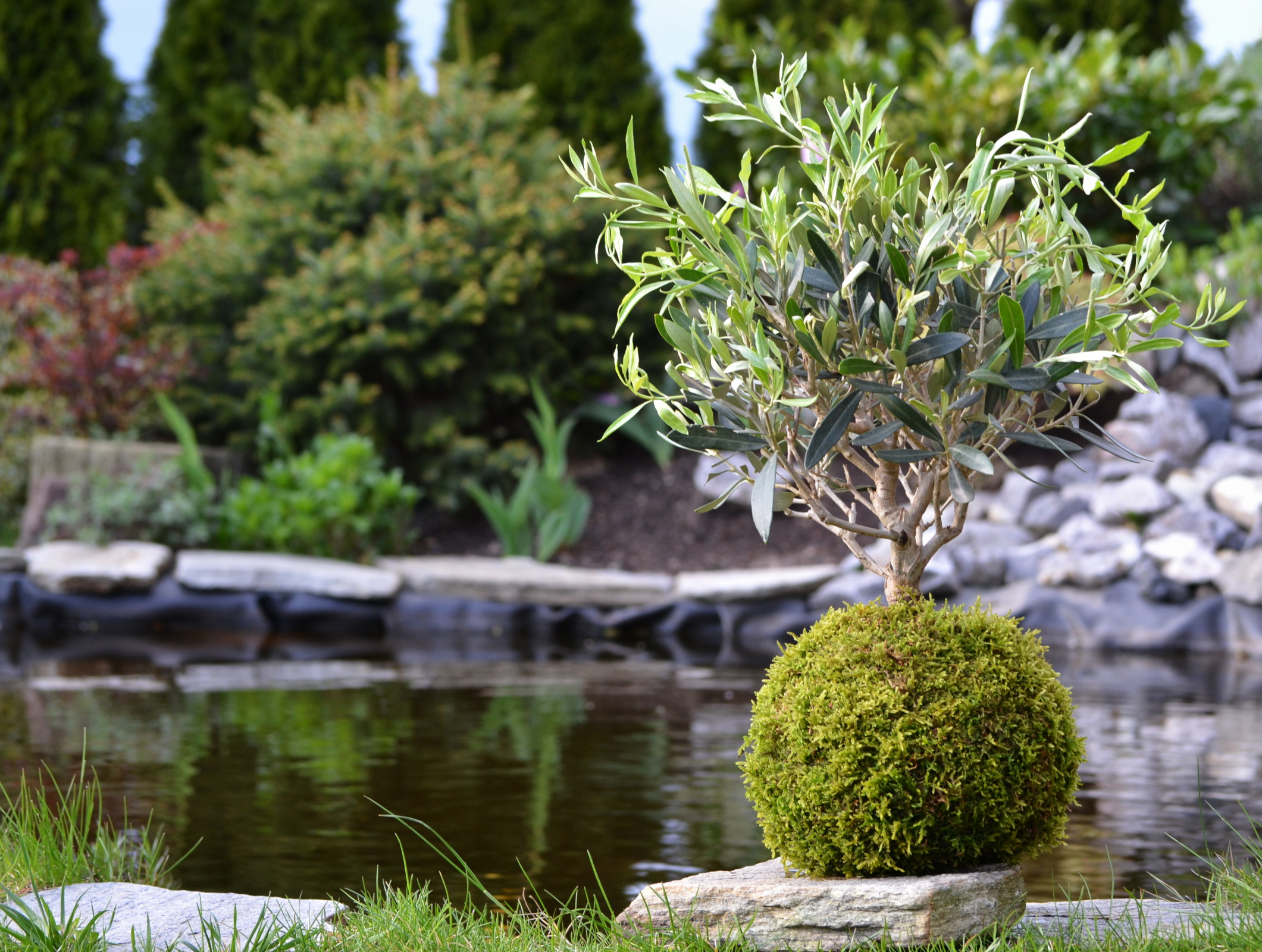 Kokedama Olea europaea